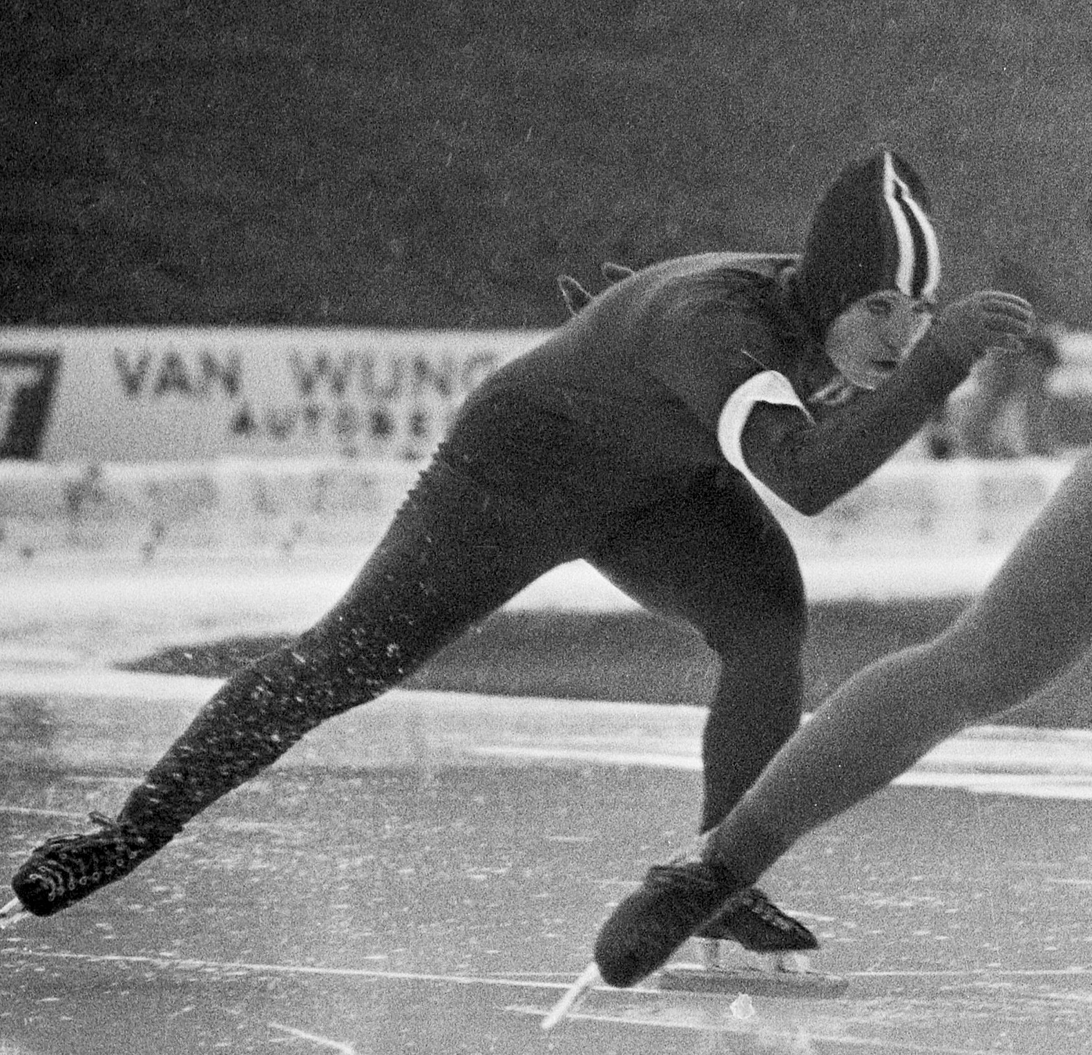 Schaatsinterland Nederland tegen USSR in Assen; Christine Jaarsma tegen Lalina Stepanskaja in aktie